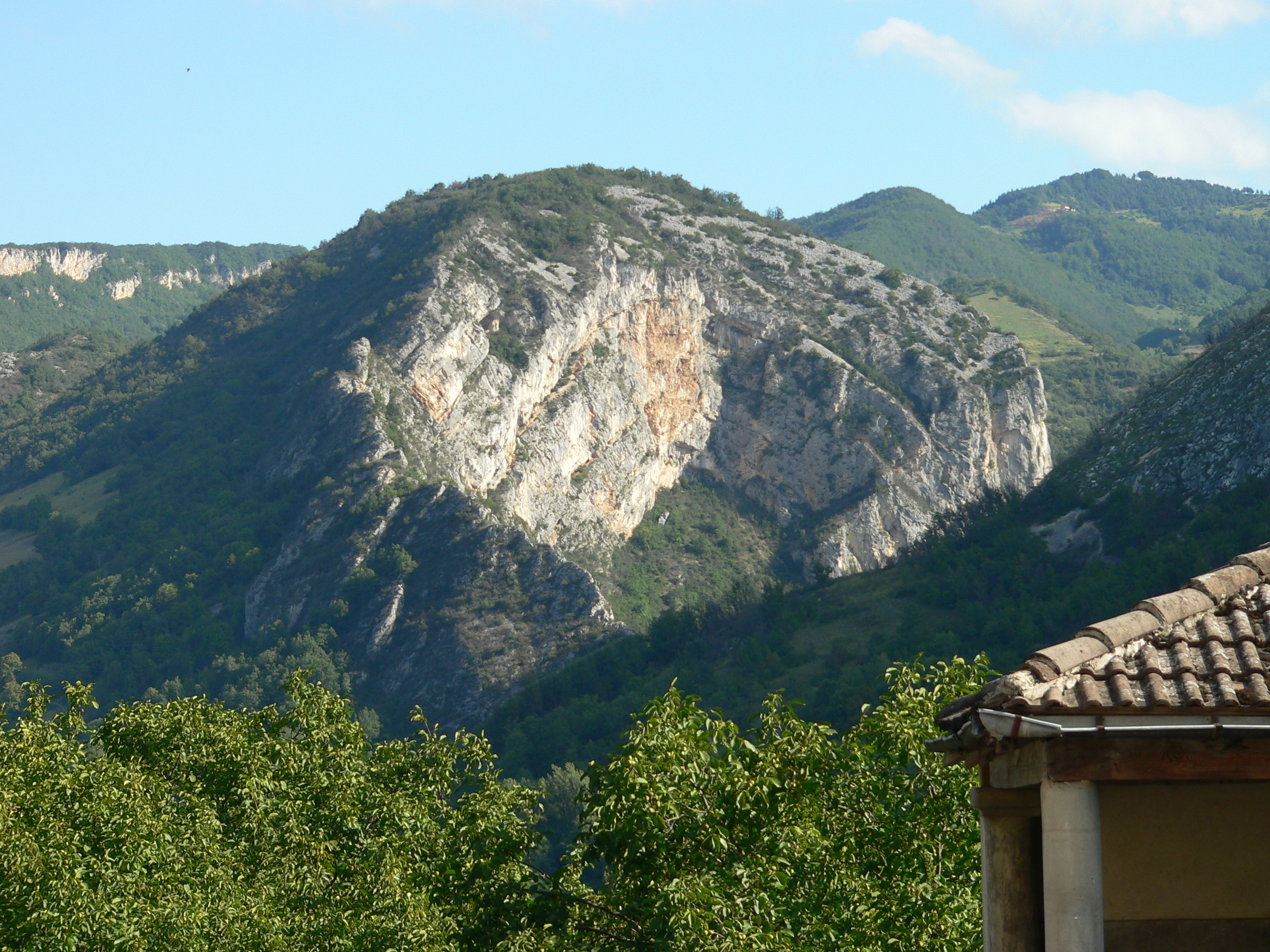 Anticlinale near Pont-en-Royans, France